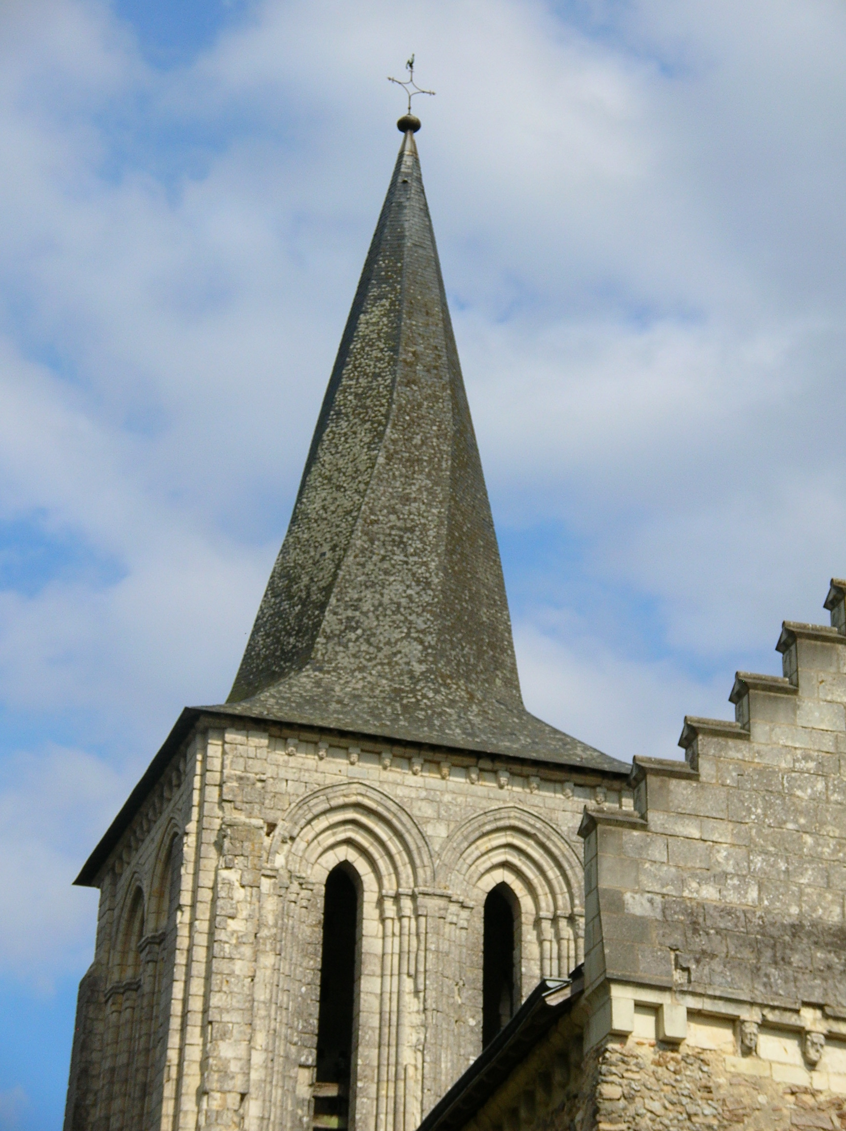 Photographie du Clocher tors de l'église Saint Germain de Mouliherne (Maine-et-Loire) prise par la maman d'Accrochoc appelée Mémé Lulu pour illustrer l'article sur les clochers tors